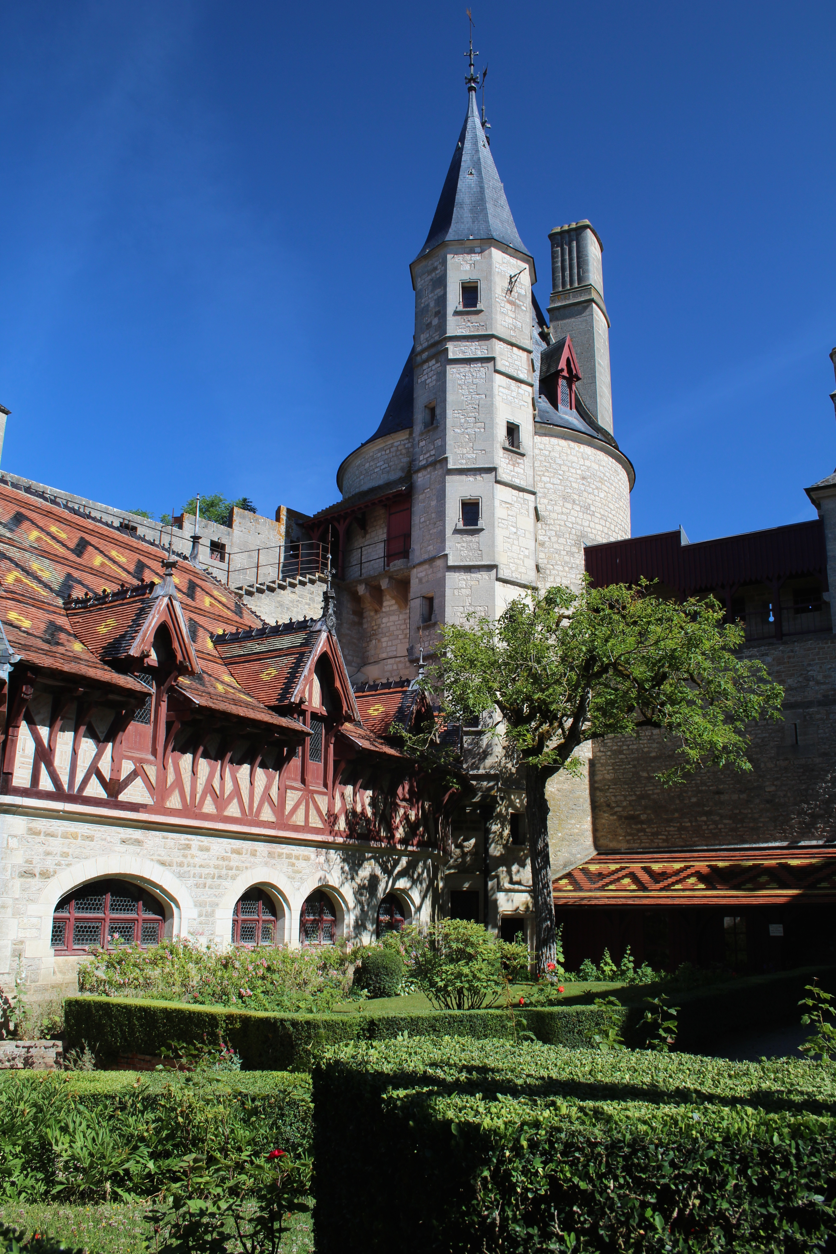 Innenhof des Schlosses Rochepot